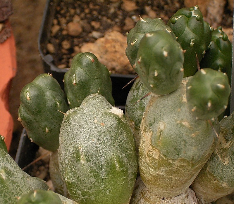 Maihueniopsis minuta - “Maihueniopsis mandragora” type